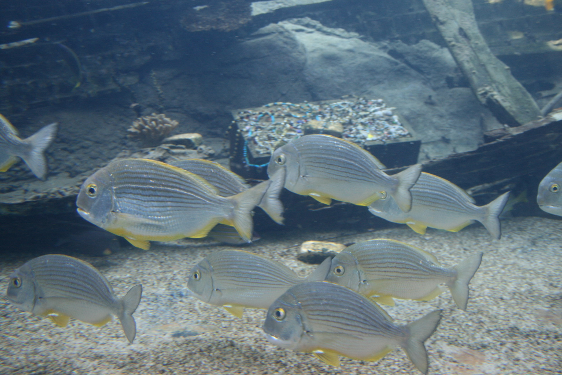 Rhabdosargus sarba